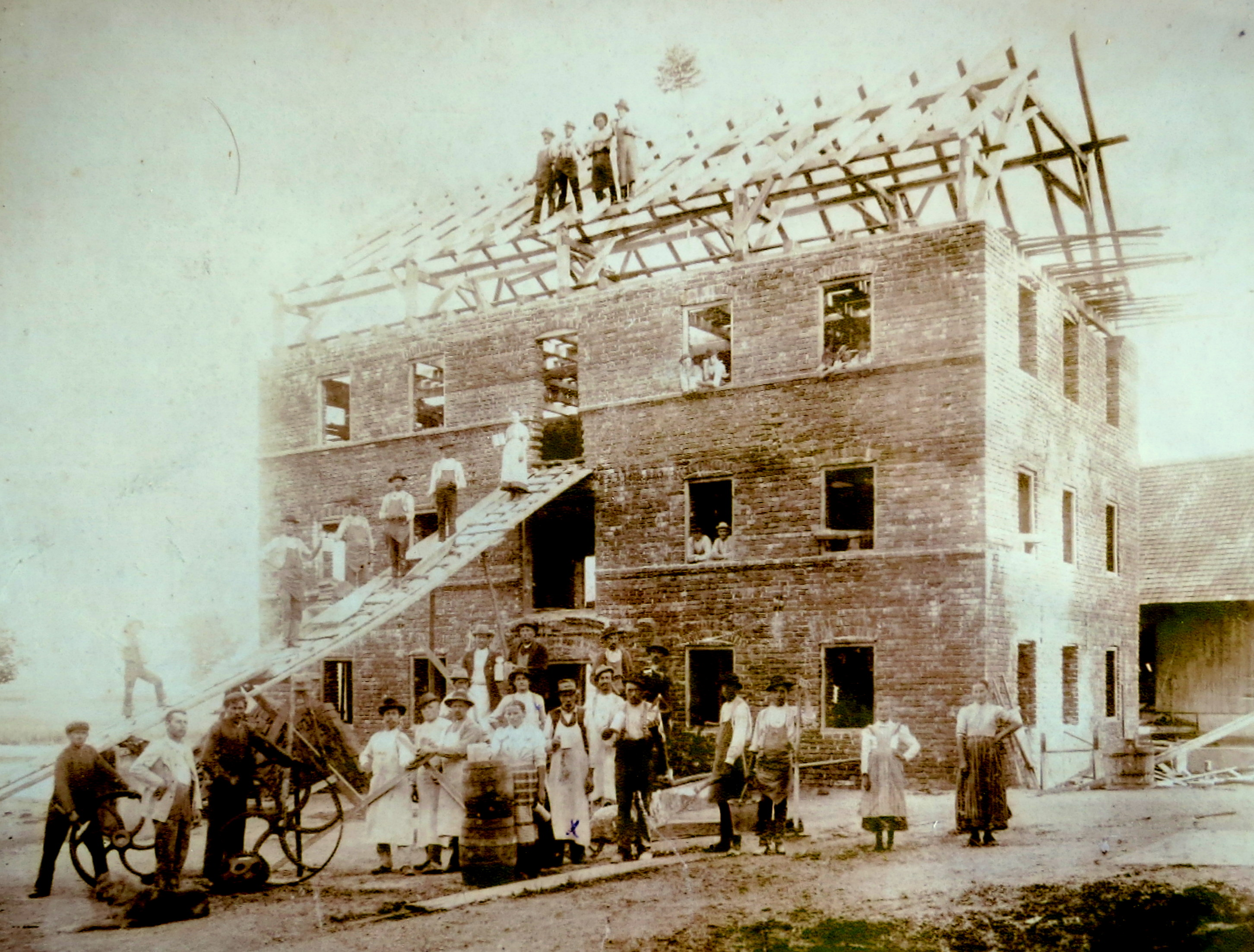 Das Bild zeigt das Richtfest des Mühlengebäudes um 1900.